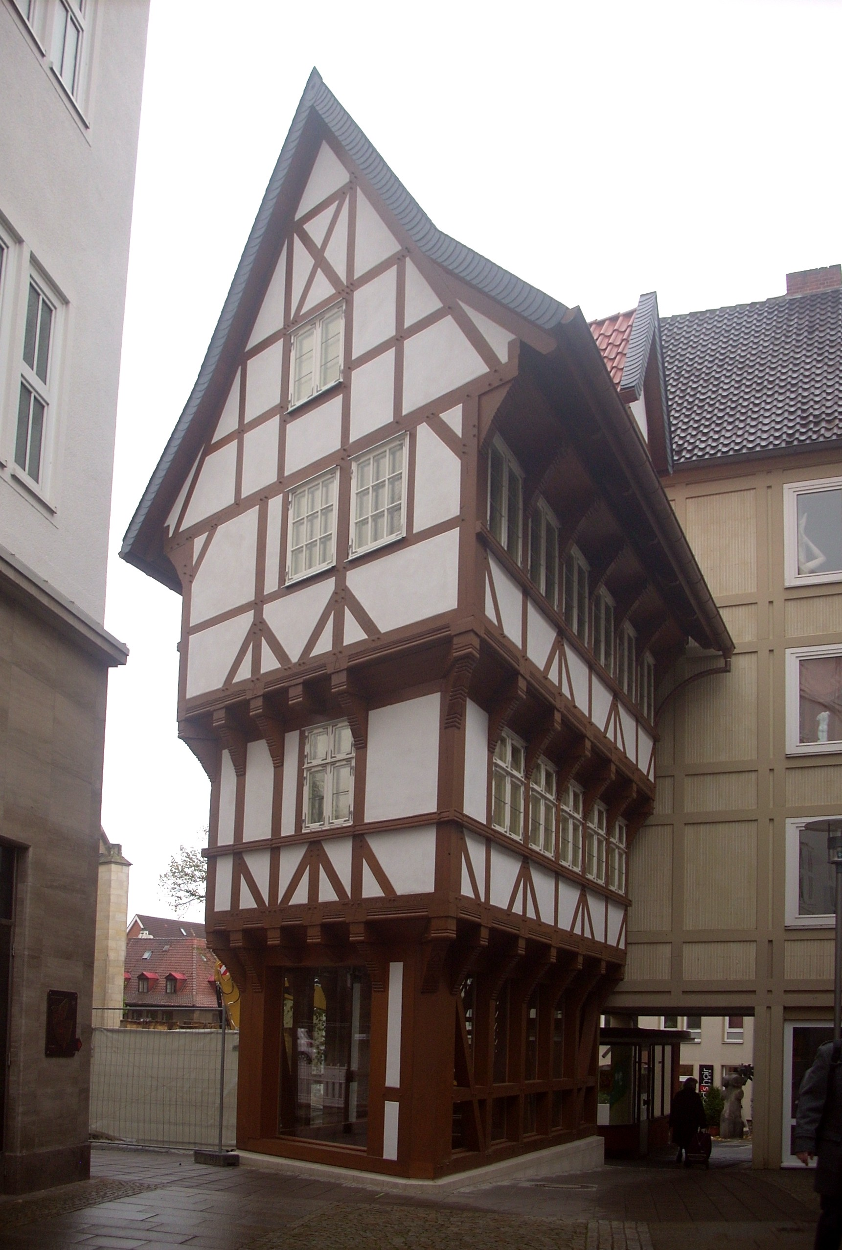 Hildesheim, Umgestülpter Zuckerhut, rekonstruiert 2009/2010